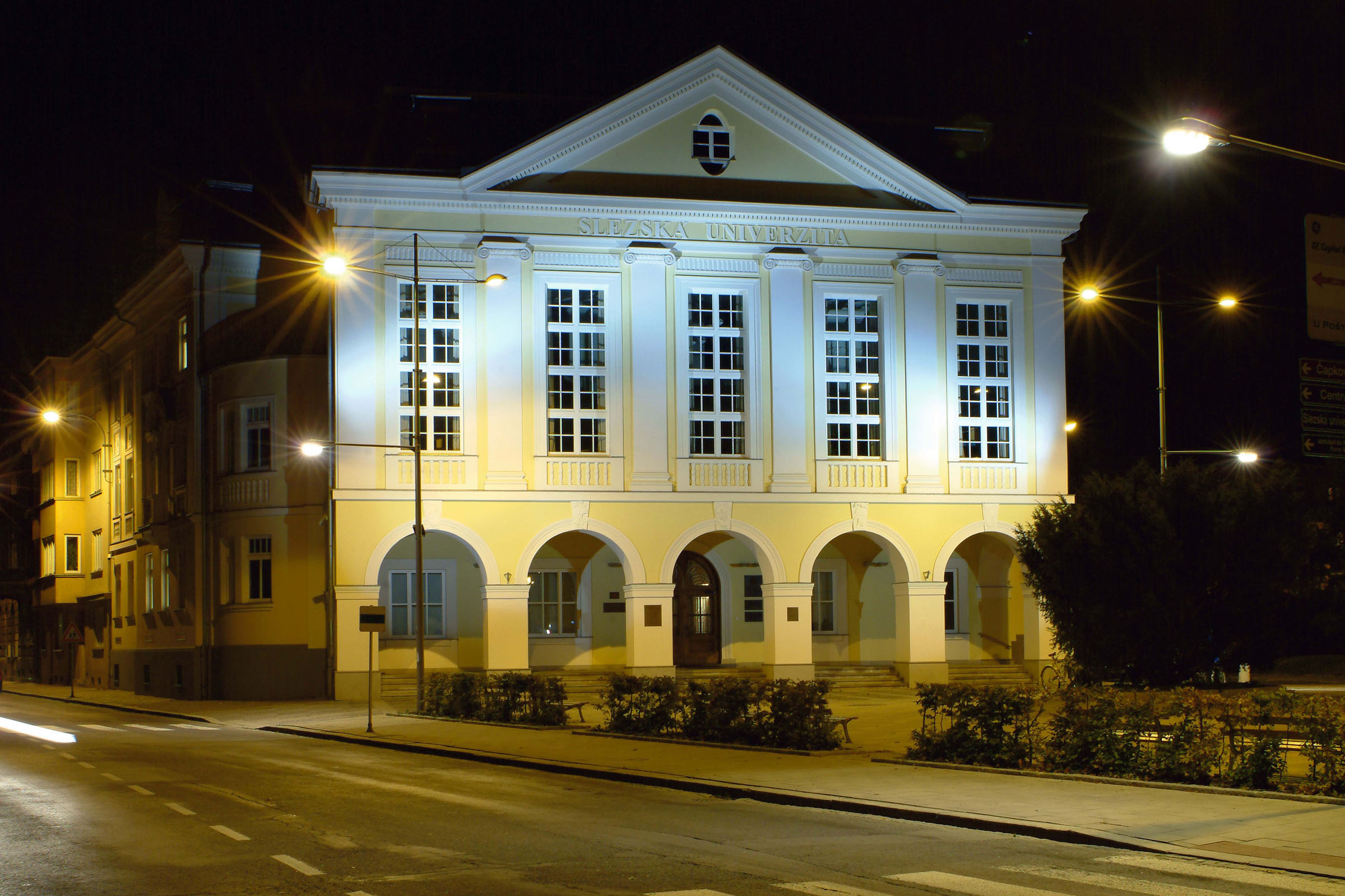 Budova rektorátu Slezské univerzity v Opavě